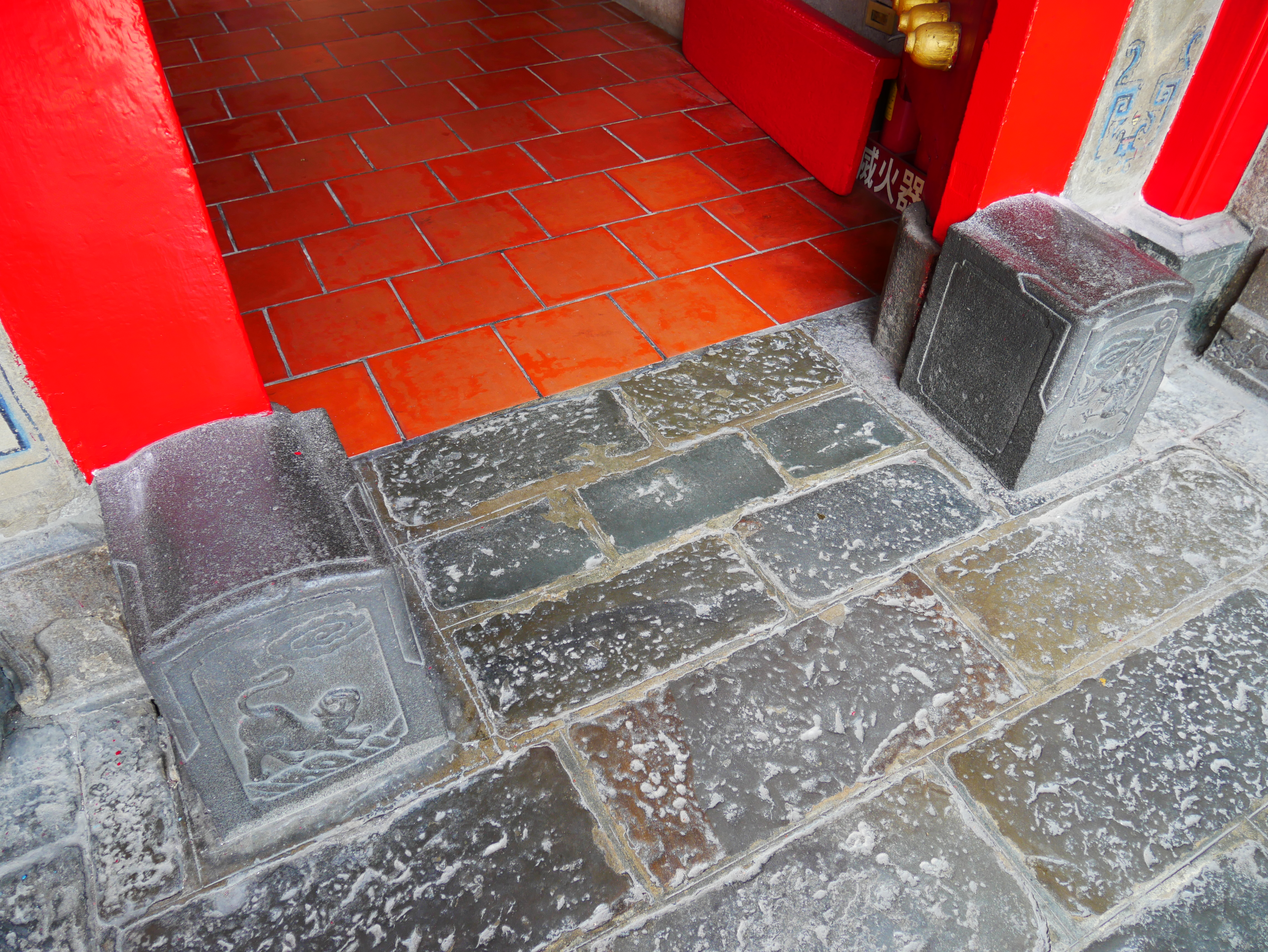 中文（台灣）: 新竹關帝廟三川殿門枕石，新竹市東區南門聯里關帝里